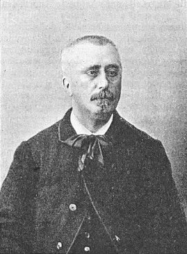 Portrait d'Émile Pouvillon